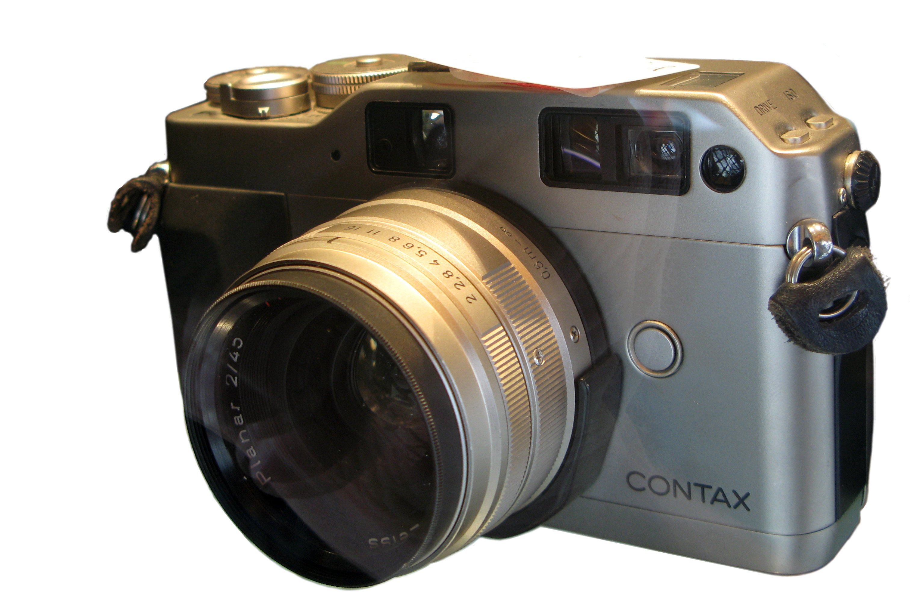 Contax G